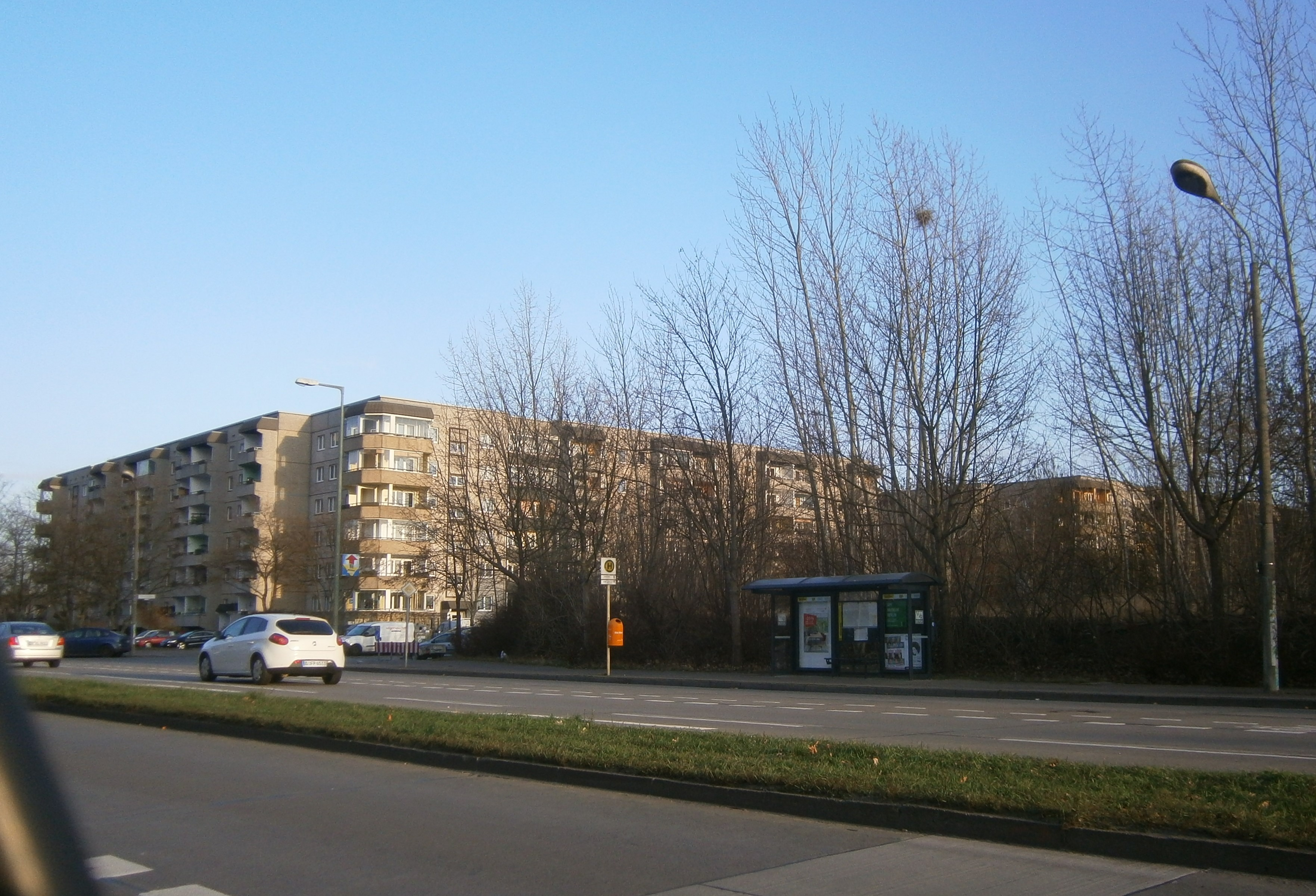 Die Hansastraße ist eine Berliner Straße mit übergeordneter Bedeutung in den Ortsteilen Alt-Hohenschönhausen und Weißensee. Sie liegt zwischen der Indira-Gandhi-Straße und der Großsiedlung Hohenschönhausen-Nord. Im Bild das Wohnquartier aus den Jahren 1988/1989 an der Ostseite - Hansastraße 52 bis 66. Vor diesen erstreckt sich der amtlich gewidmete Seitenast zum erschließen der hinteren Wohnhäuser.